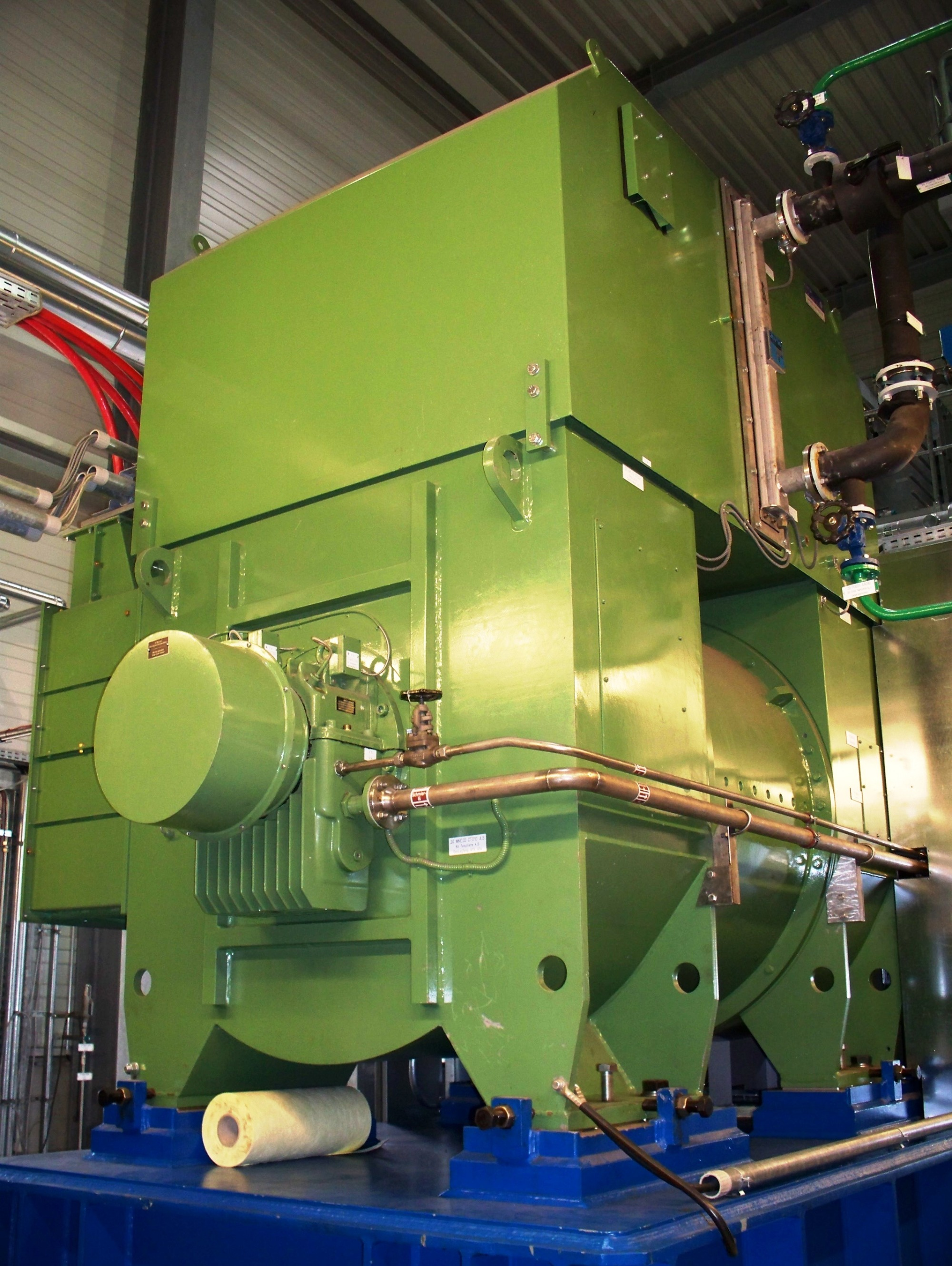 Der Generator im Geothermiekraftwerk Unterhaching mit dem eine Leistung von ca. 3,36 Megawatt Strom erzeugt wird.